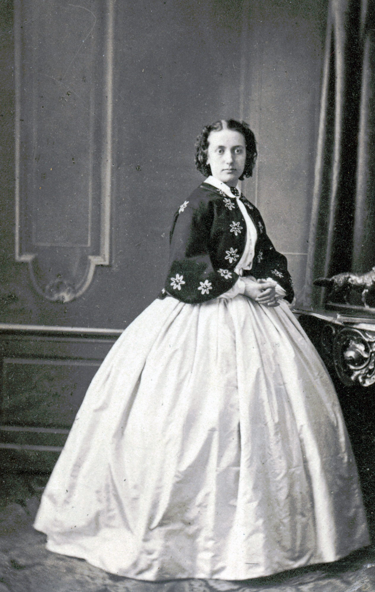 Mary Hammarfeldt, skådespelare vid Kungliga Dramatiska teatern 1863